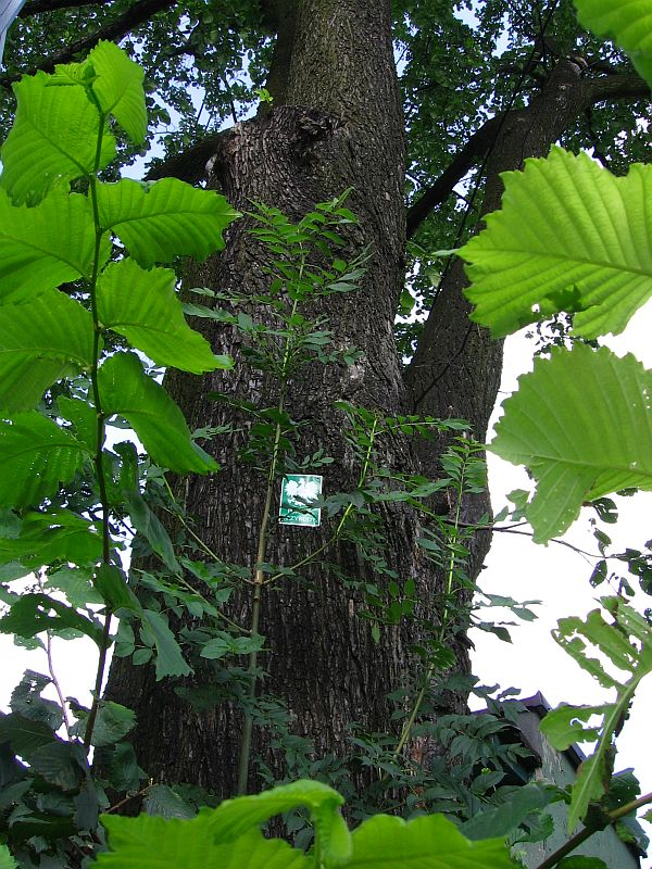 Pomnik przyrody - wiąz szypułkowy (Staszic, Dąbrowa Górnicza)